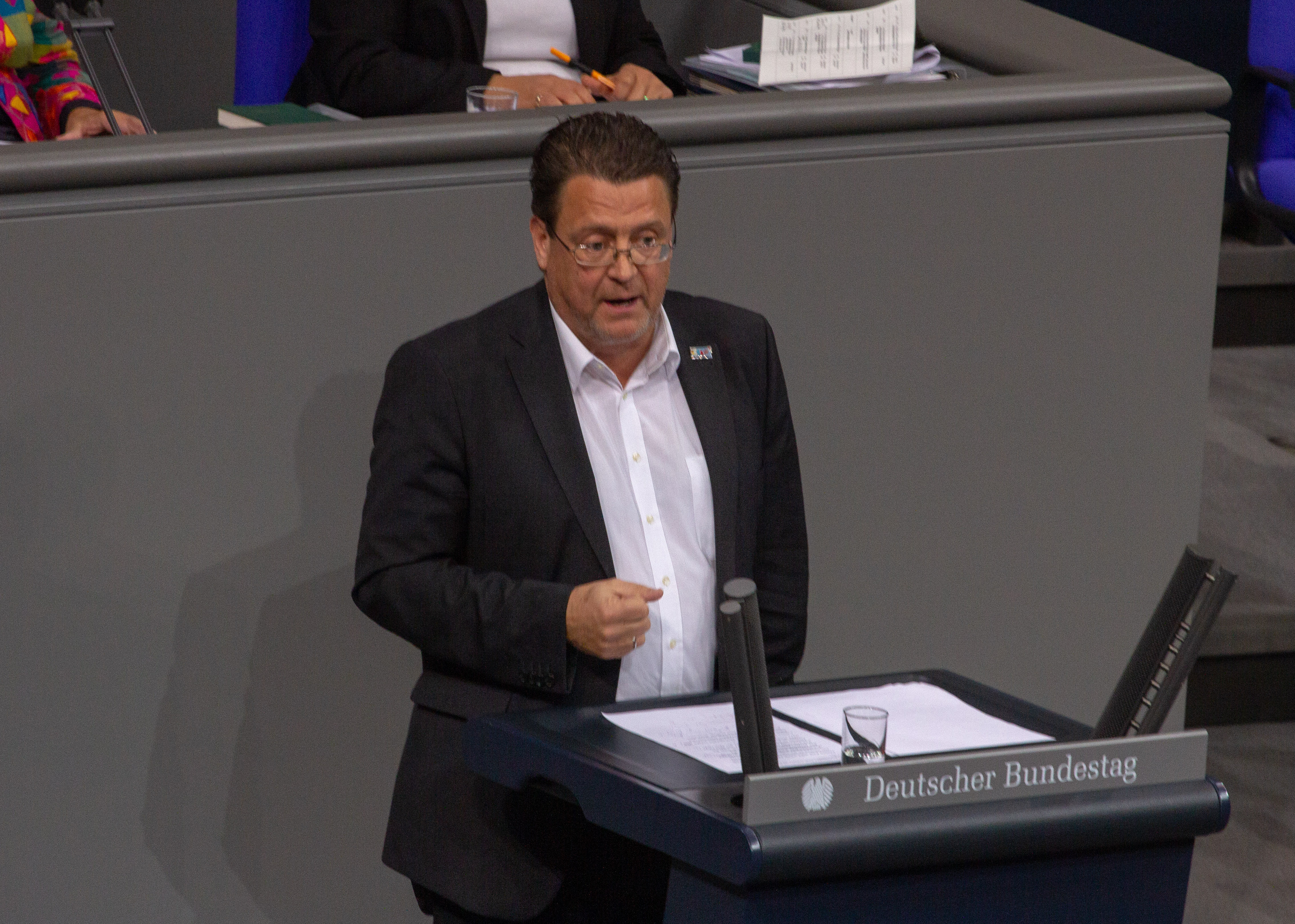 Stephan Brandner, Mitglied des Deutschen Bundestages, während einer Plenarsitzung am 11. April 2019 in Berlin.